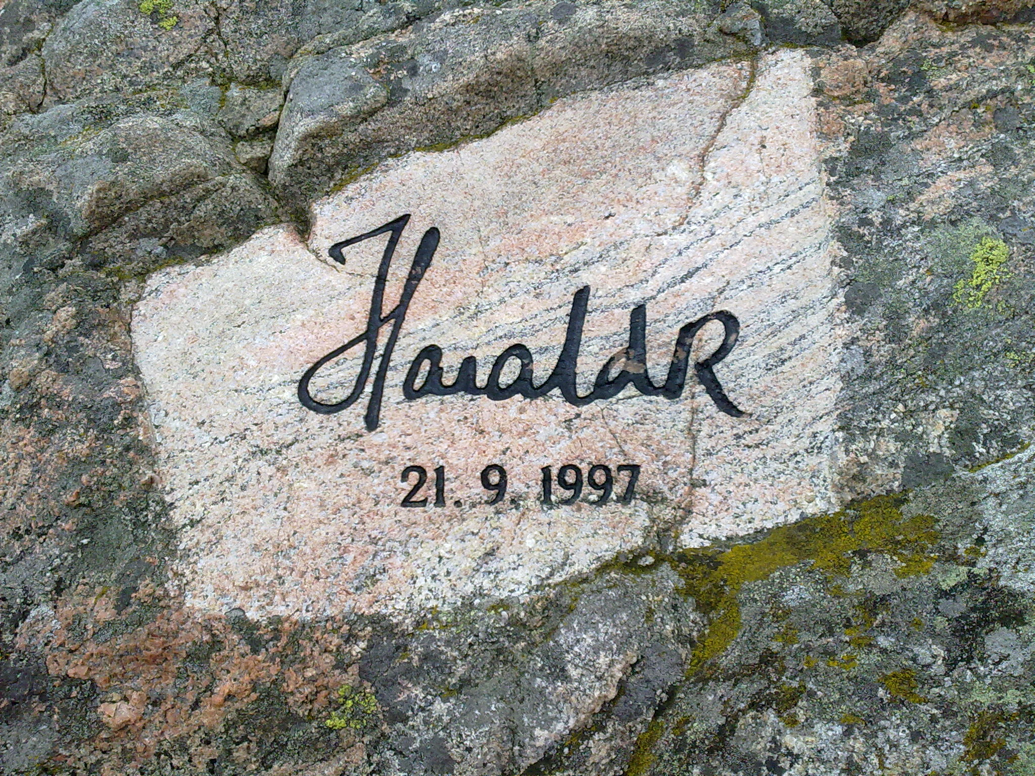 Harald V sin signatur i fjellet ved Lindesnes fyr